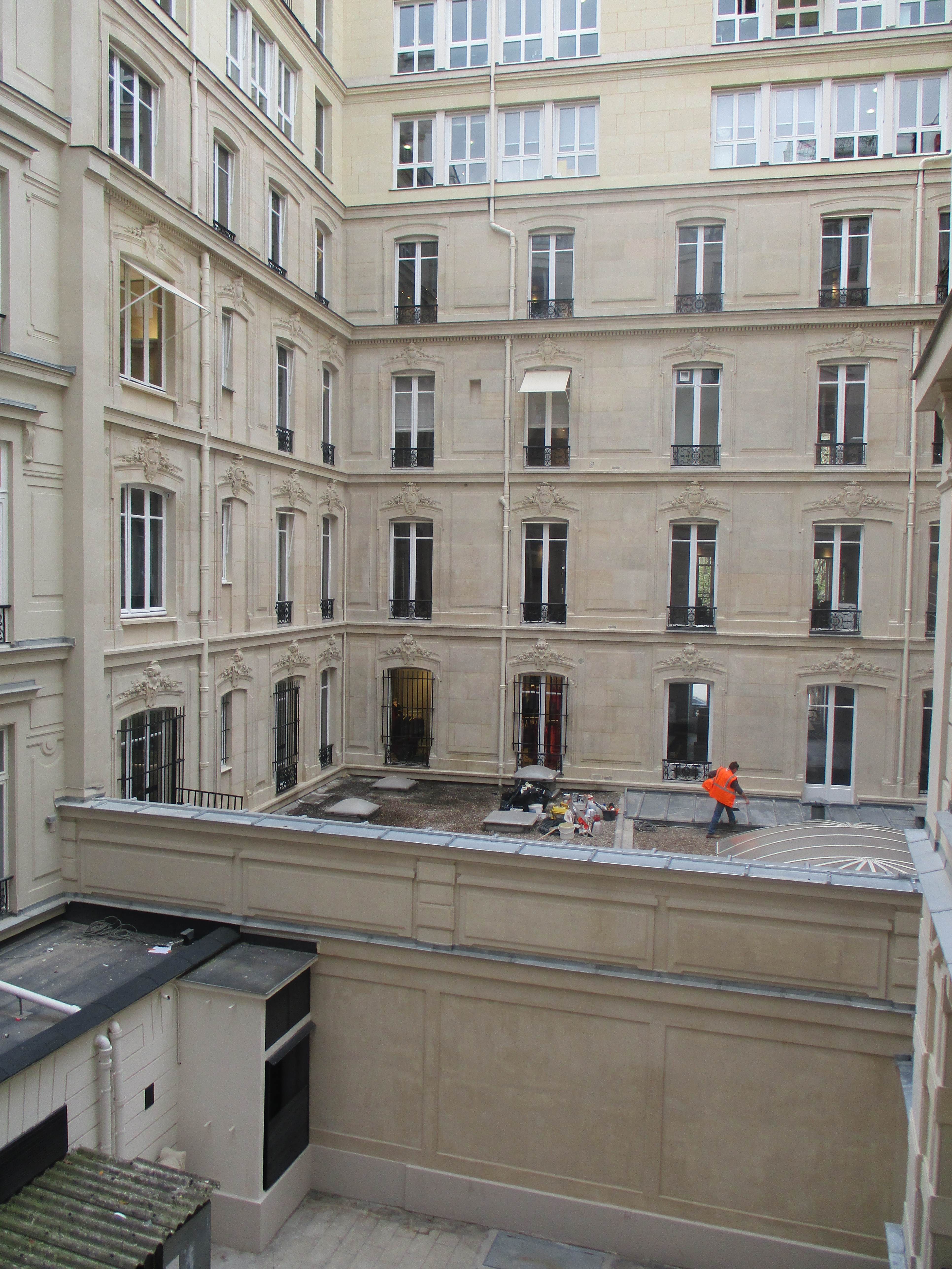 Cour d'immeuble dans le quartier des Champs-Élysées.